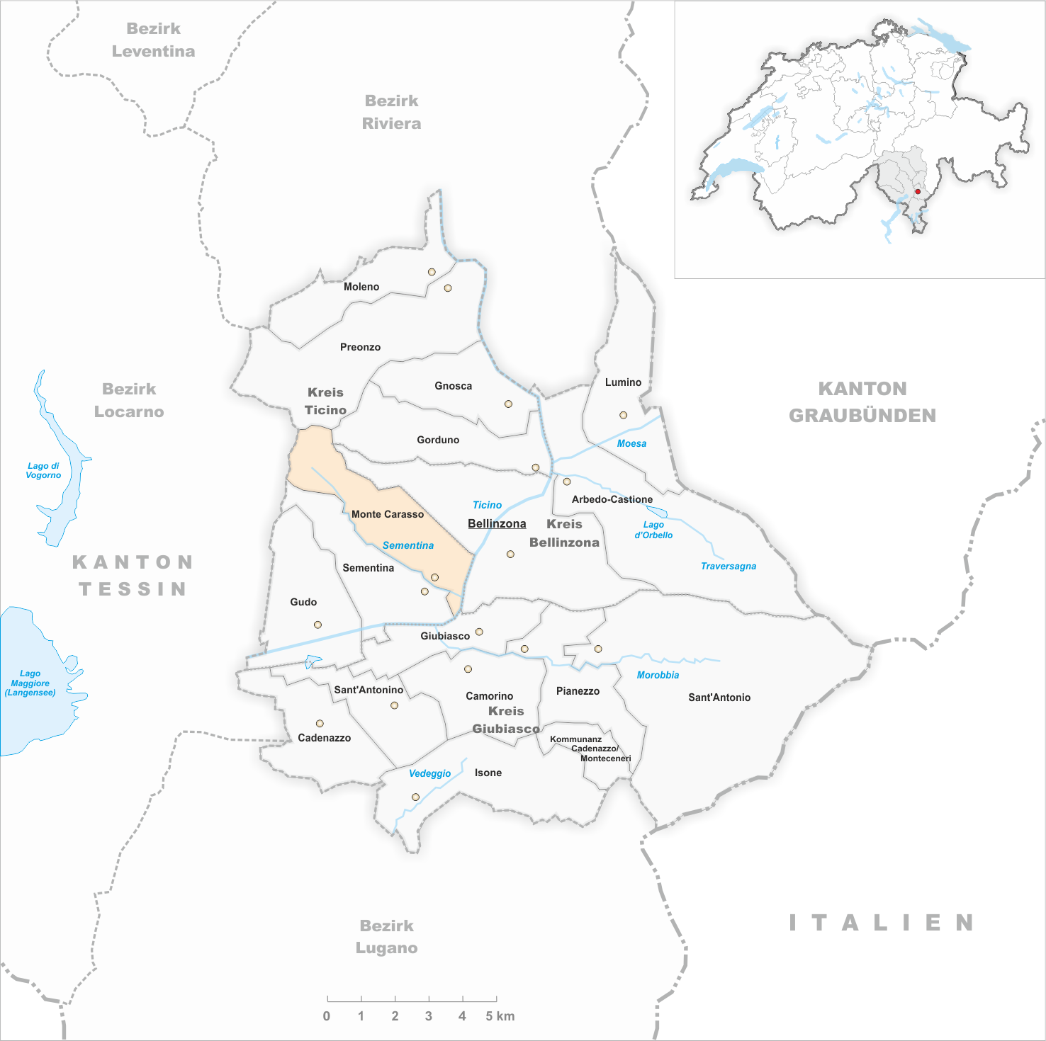 Municipality Monte Carasso